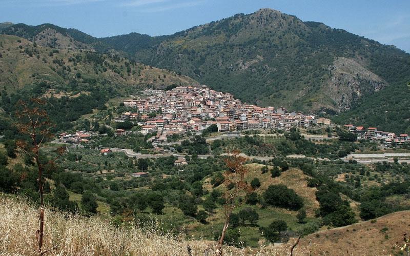 Sicilia Malvagna